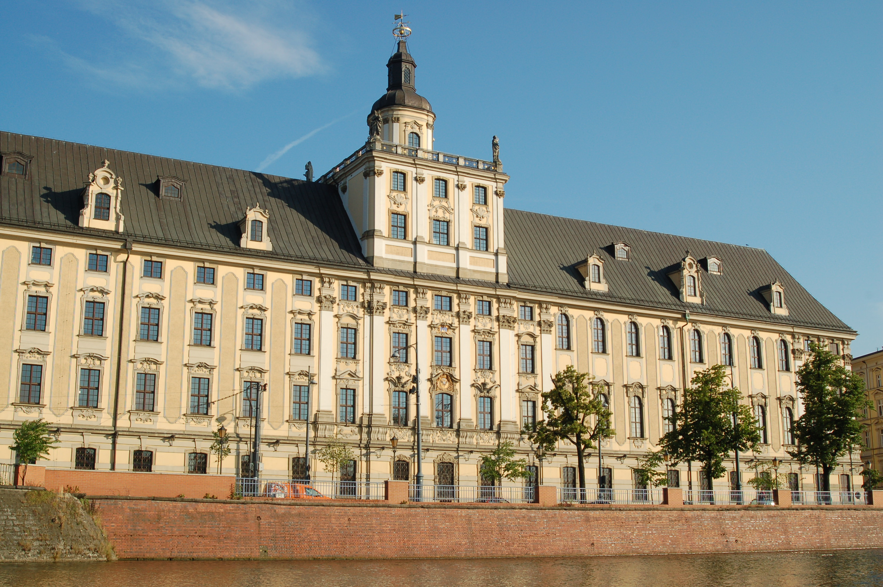 Uniwersytet Wrocławski, d. Kolegium Jezuickie pl. Uniwersytecki 1, Miasto Wrocław - Stare Miasto